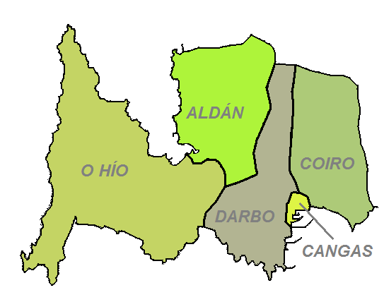 Las cinco parroquias que conforman el municipio de Cangas.